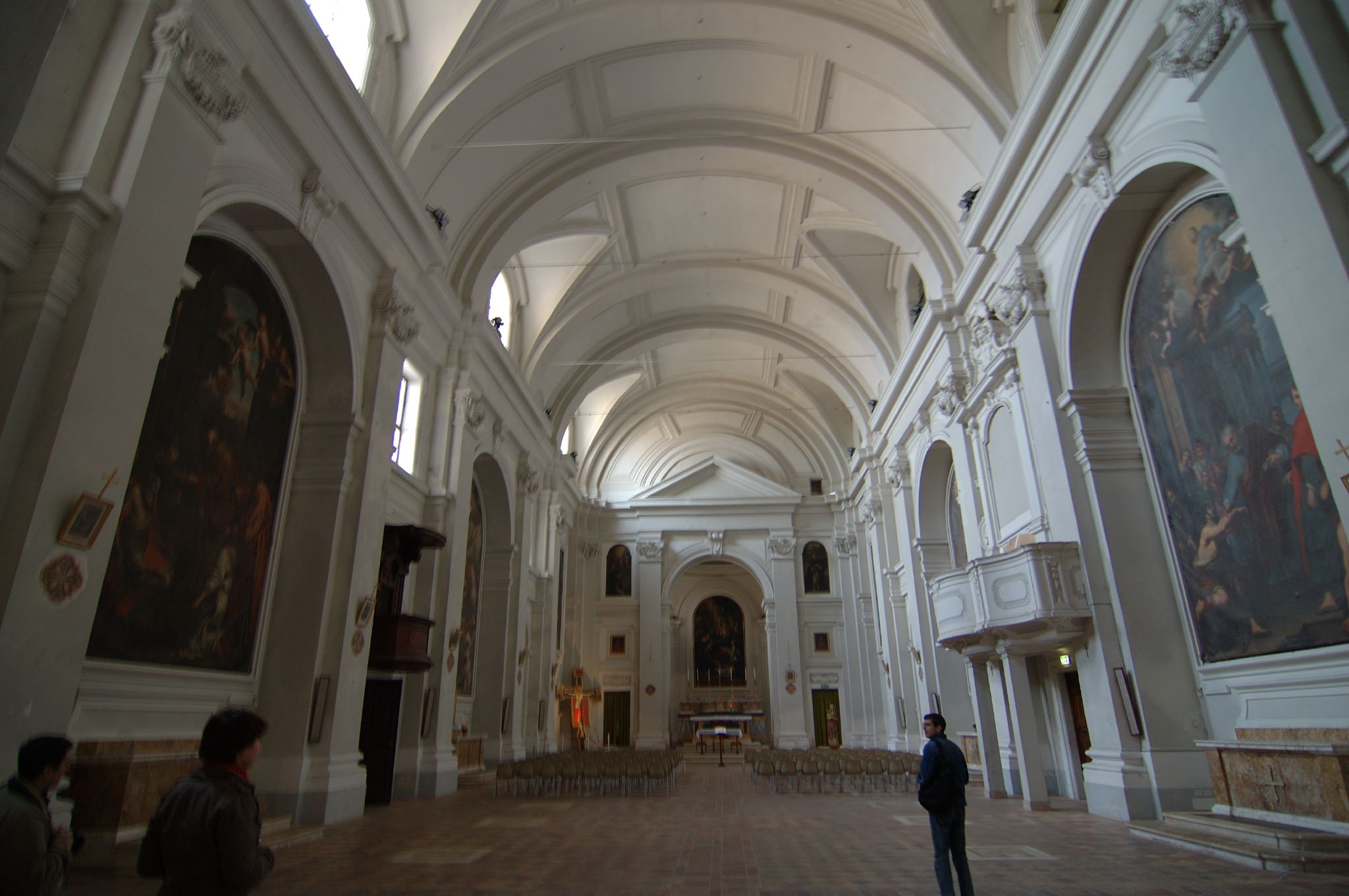 Urbino, Marche, Italia